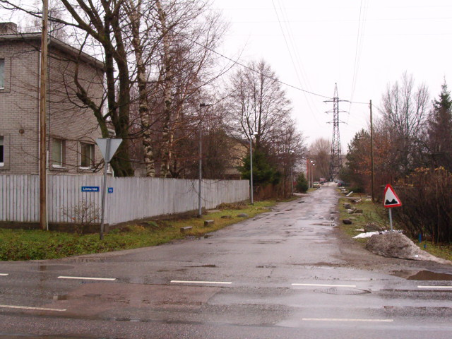 Nirgi tänav. Lilleküla, Tallinn